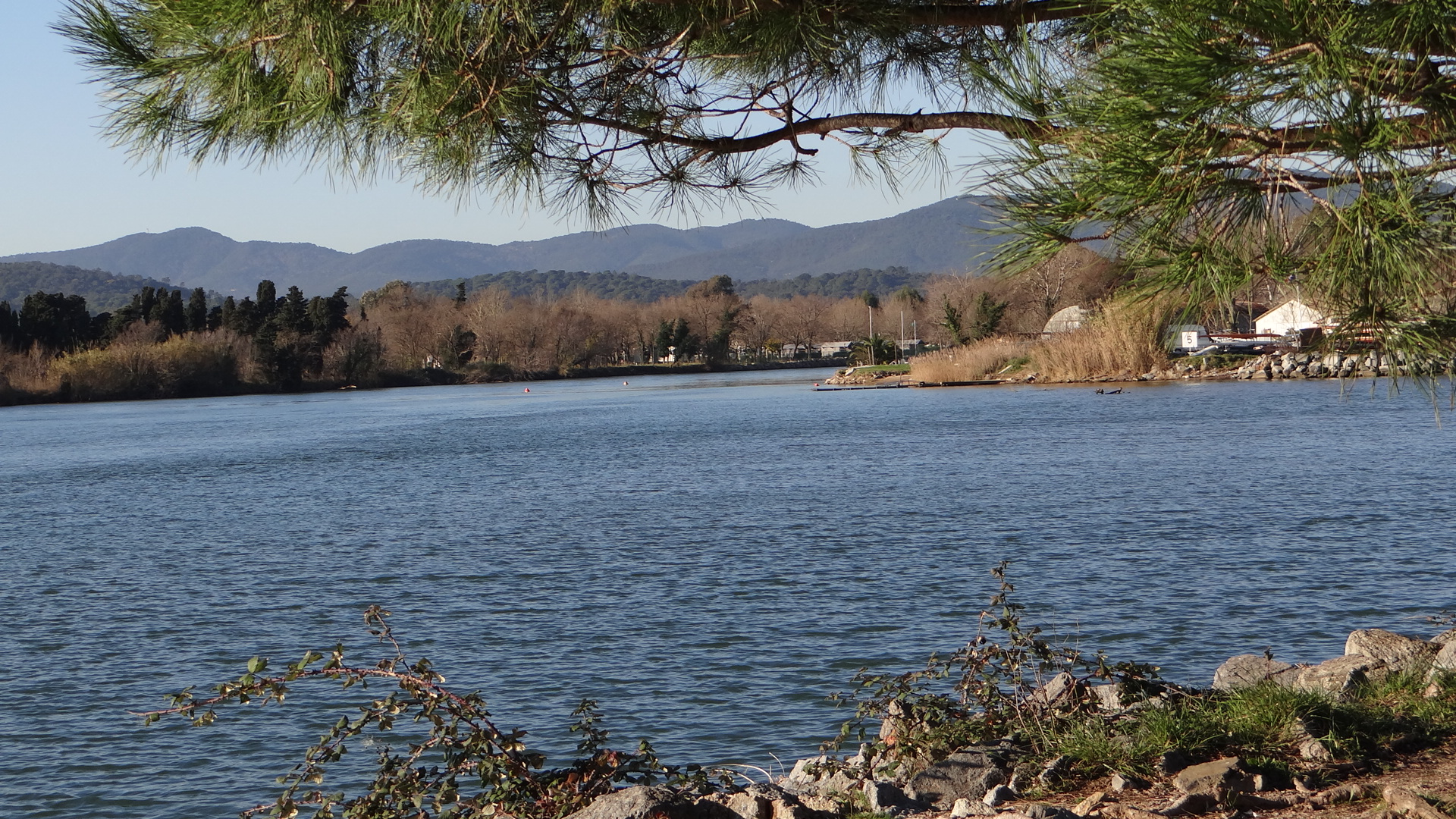 Base nature de Fréjus